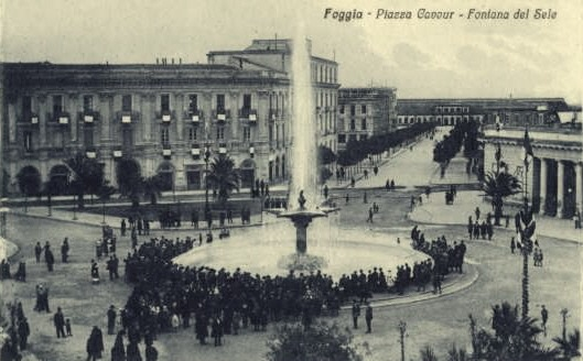 1923, inaugurazione fontana del Sele